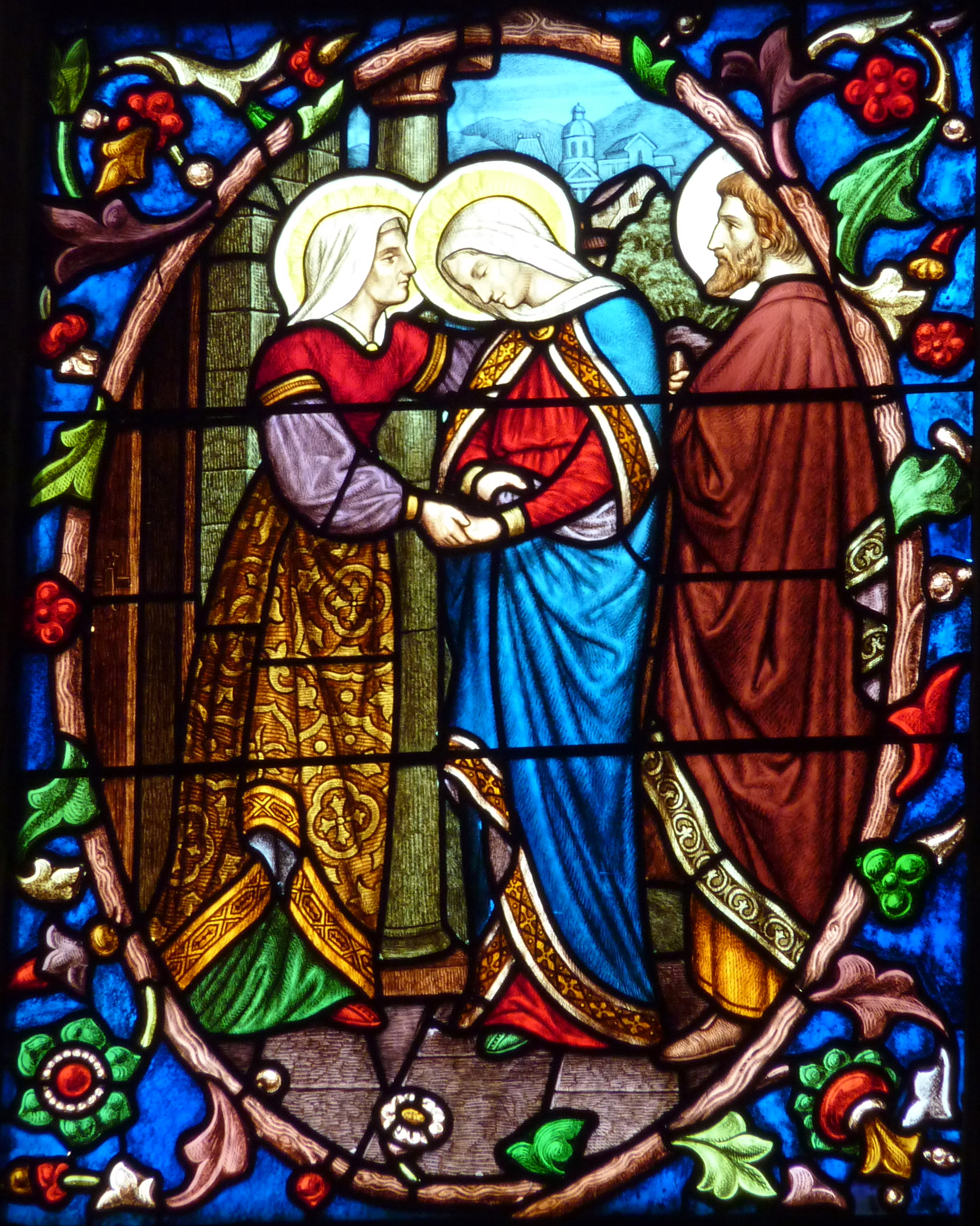 Bleiglasfenster (Ausschnitt) in der Kathedrale Saint-Maclou in Pontoise, Darstellung: Visitation